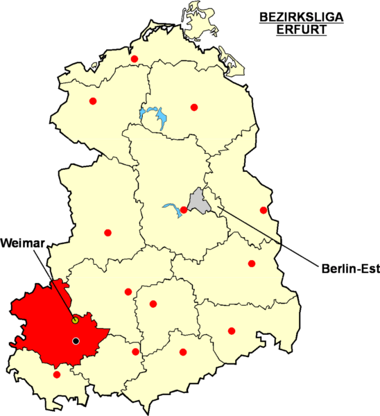 Localisation de Weimar dans la "Bezirksliga Erfurt" Catégorie:Logo de clubs de football - Allemagne